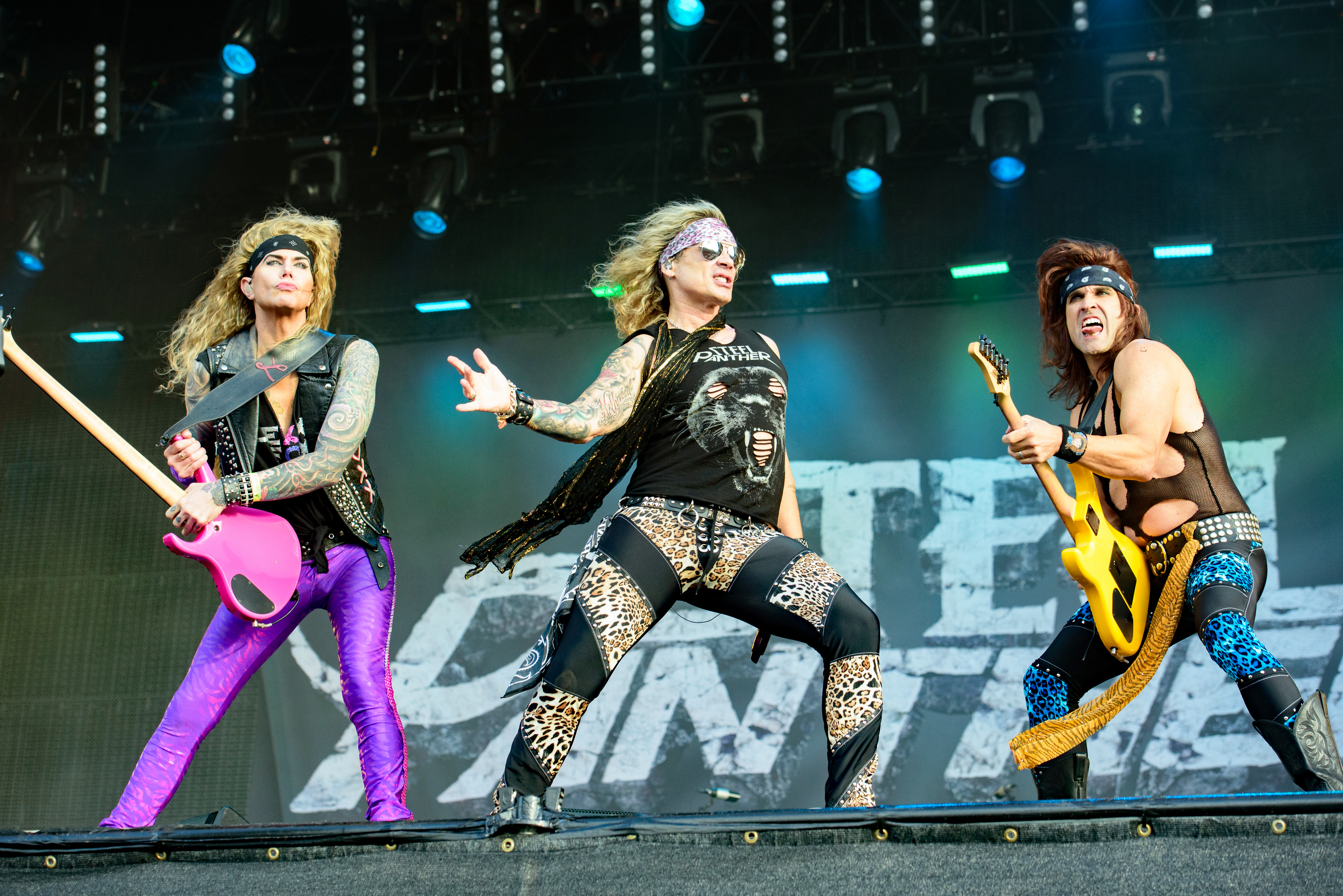 Steel Panther beim Wacken Open Air 2016